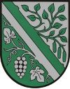 Wappen der Gemeinde Pirching